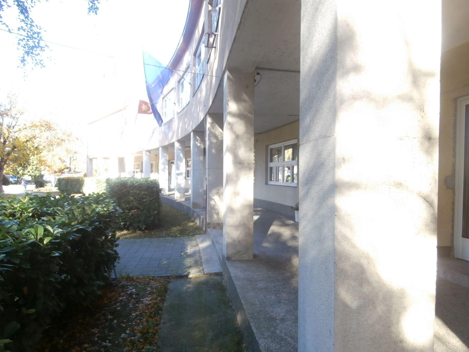 Vjenceslav Richter: Kotarska upravna zgrada (idejni projekt), Sveti Ivan Zelina, detalj pročelja, 1951. 1953.